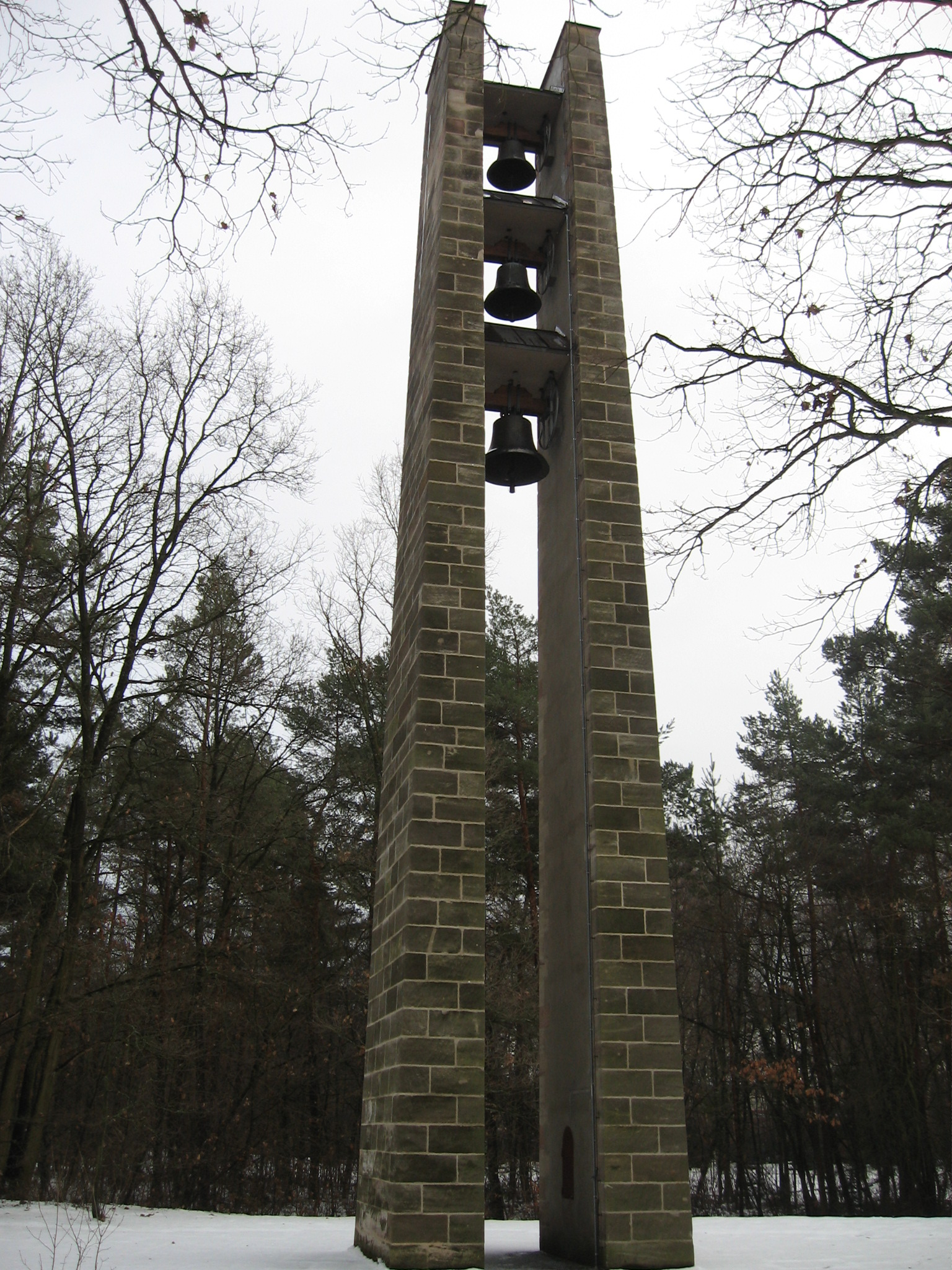 Glockenturm (genauer gesagt: zwei Türme) im Südteil des Südfriedhofs in Nürnberg. Hier das Glockenläuten.